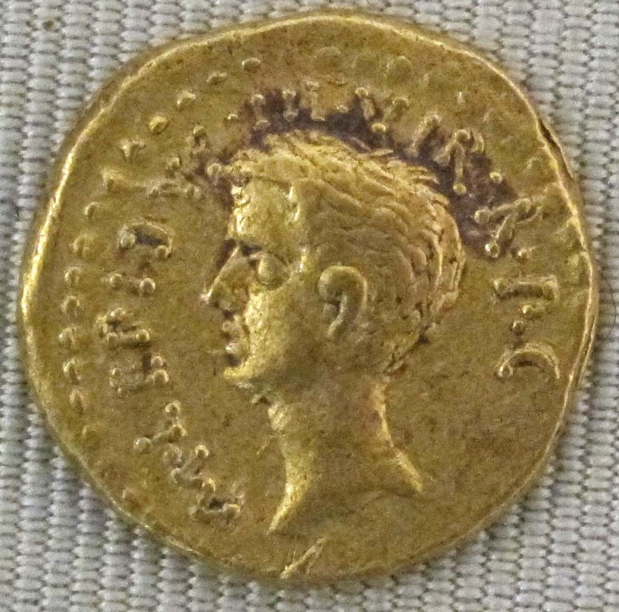 Repubblica, lepido, aureo, 42 a.c.